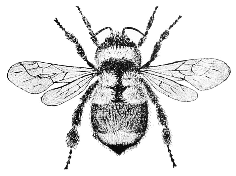 Orange banded bumblebee